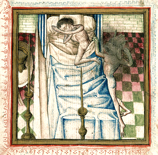 ChampionDesDames-Miroir de la Mort-Carpentras410-f14vd : Diable terrifiant un mourant